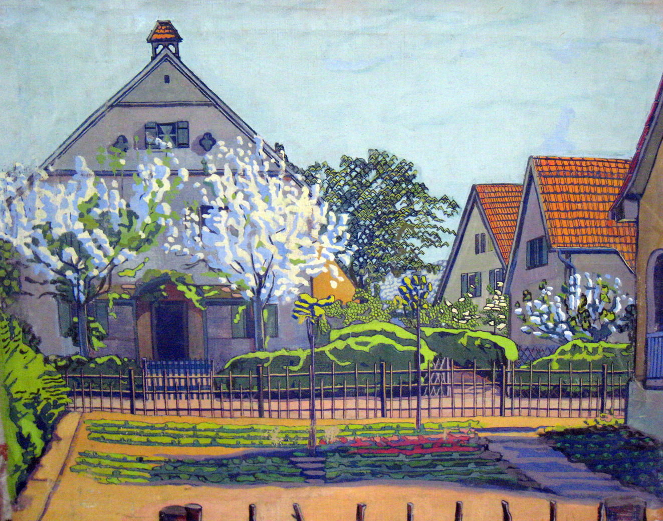 Gemälde von der Gronauer Waldsiedlung